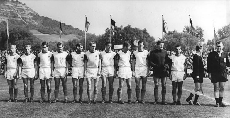 Zentralbild Liebers 27.5.1968 Jena: Fußball-Oberliga - FC Carl Zeiss Jena neuer Meister. Durch den 2:0-Erfolg über den Titelträger FC Karl-Marx-Stadt (am 25.5.1968 in Jena) sicherte sich der FC Carl Zeiss Jena (Foto) bereits einen Spieltag vor Abschluß der Oberligaserie den deutschen Fußballmeistertitel der DDR. V.l.n.r.: Müller [es handelt sich um Jürgen Werner], Schlutter, Brunner, Preusse, W. Krauss, Stein, Strempel, Scheitler, Marx, Torwart Blochwitz und Mannschaftskapitän R. Ducke.